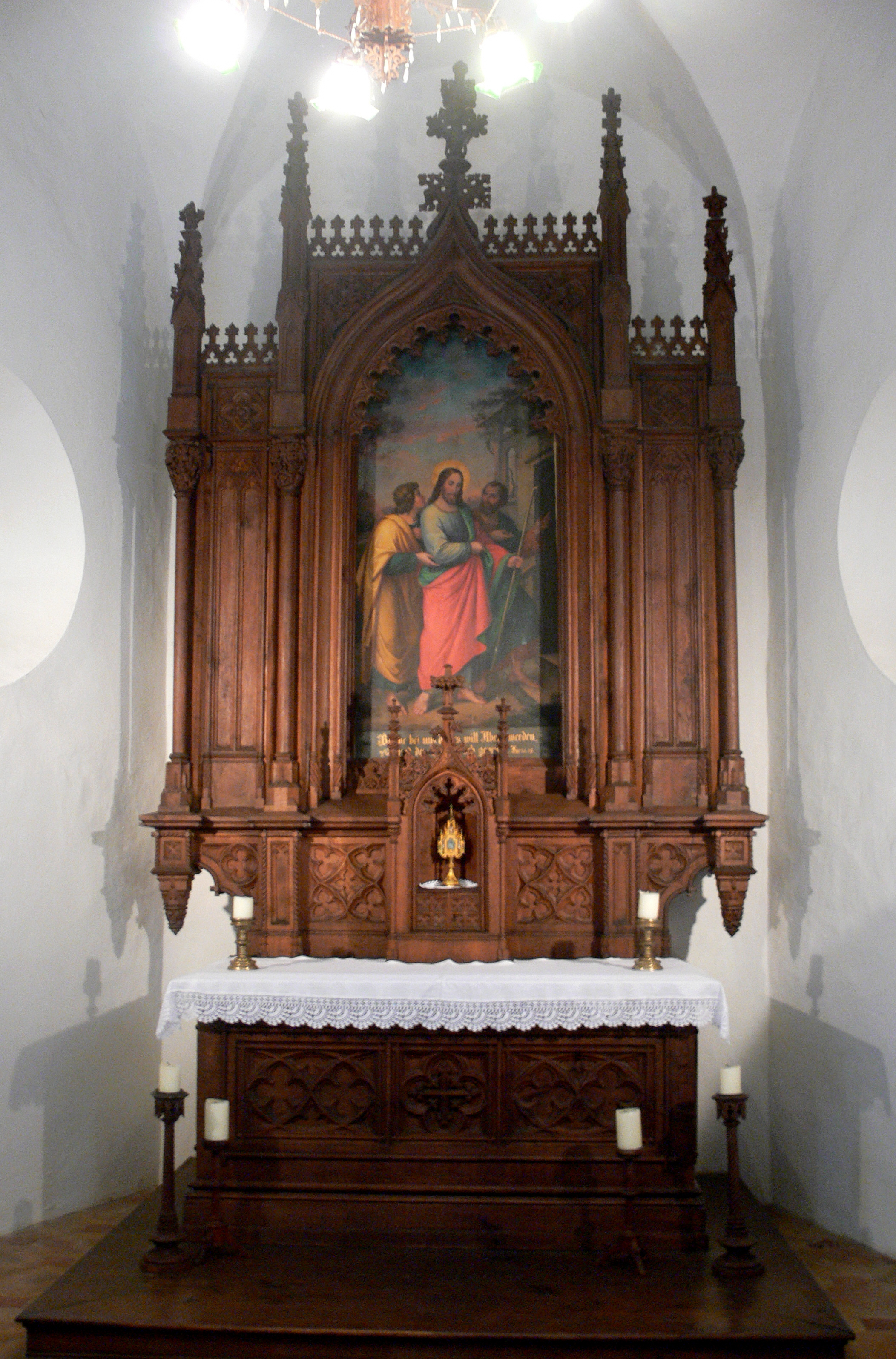 Rittergut Mosisgreut, Vogt, Landkreis Ravensburg Kapelle St. Sebastian, Altar von Theodor Schnell d. Ä., 19. Jh.